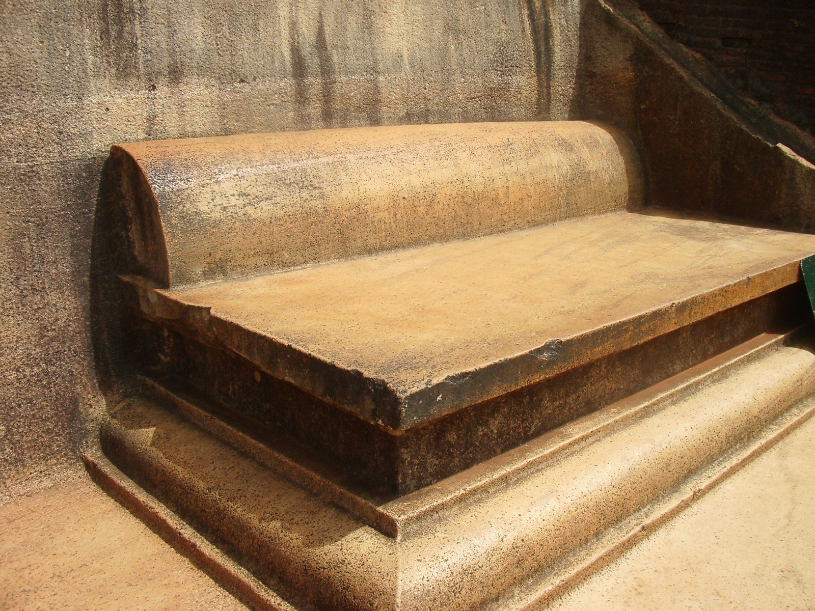 Tron del palau superior de Sigiriya, foto feta per J. Ollé el juliol del 2006.